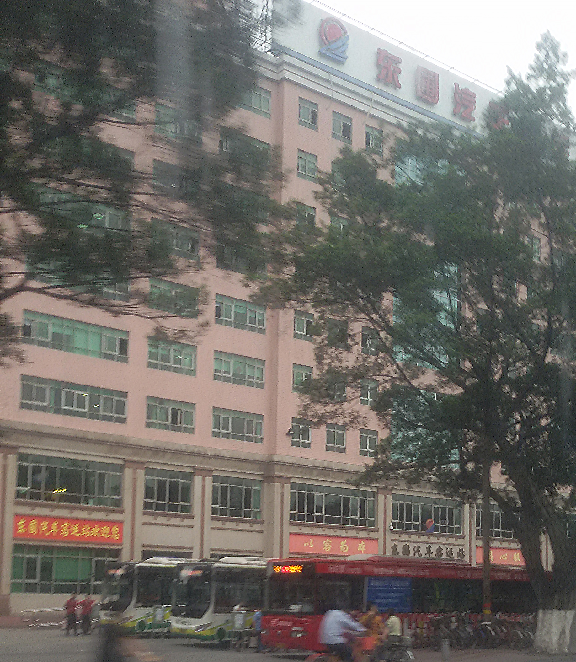 粵語: 东圃汽车客运站